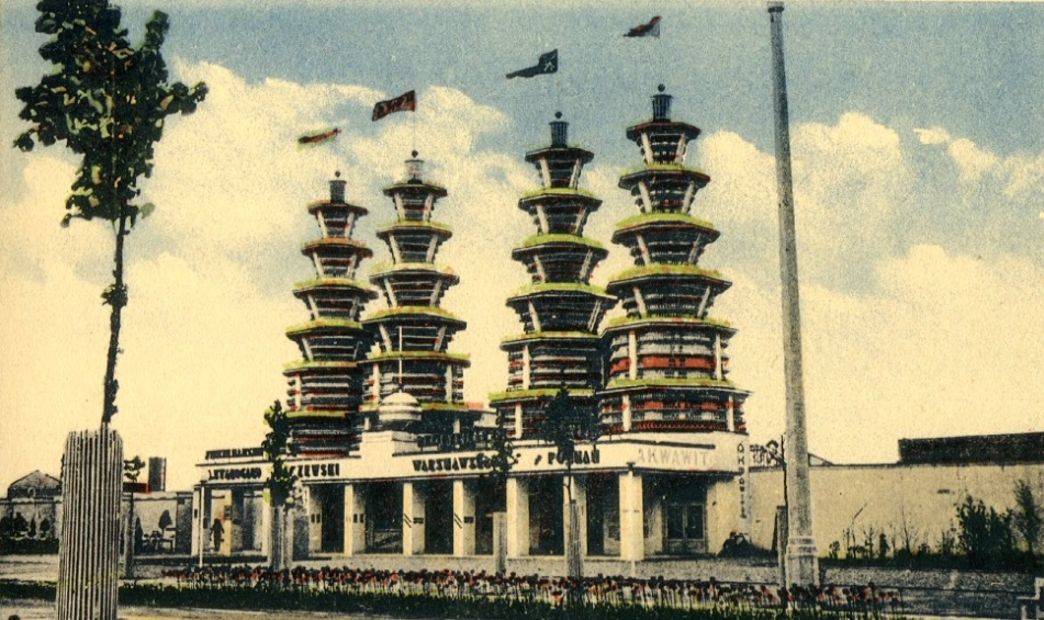 PWK 1929 - Pawilon Przemysłu Włókienniczego